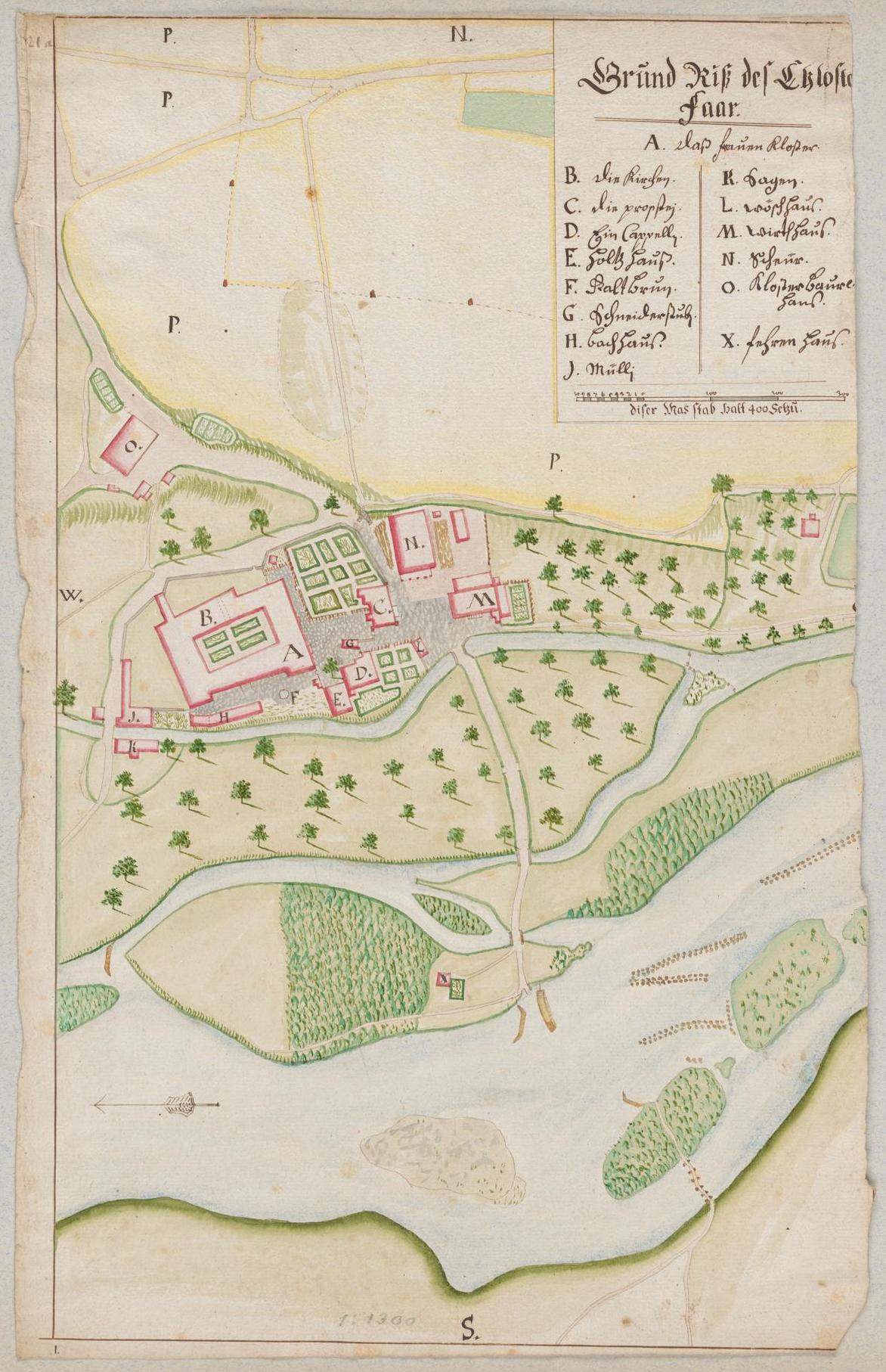 Grundriss des Kloster Fahr um 1800